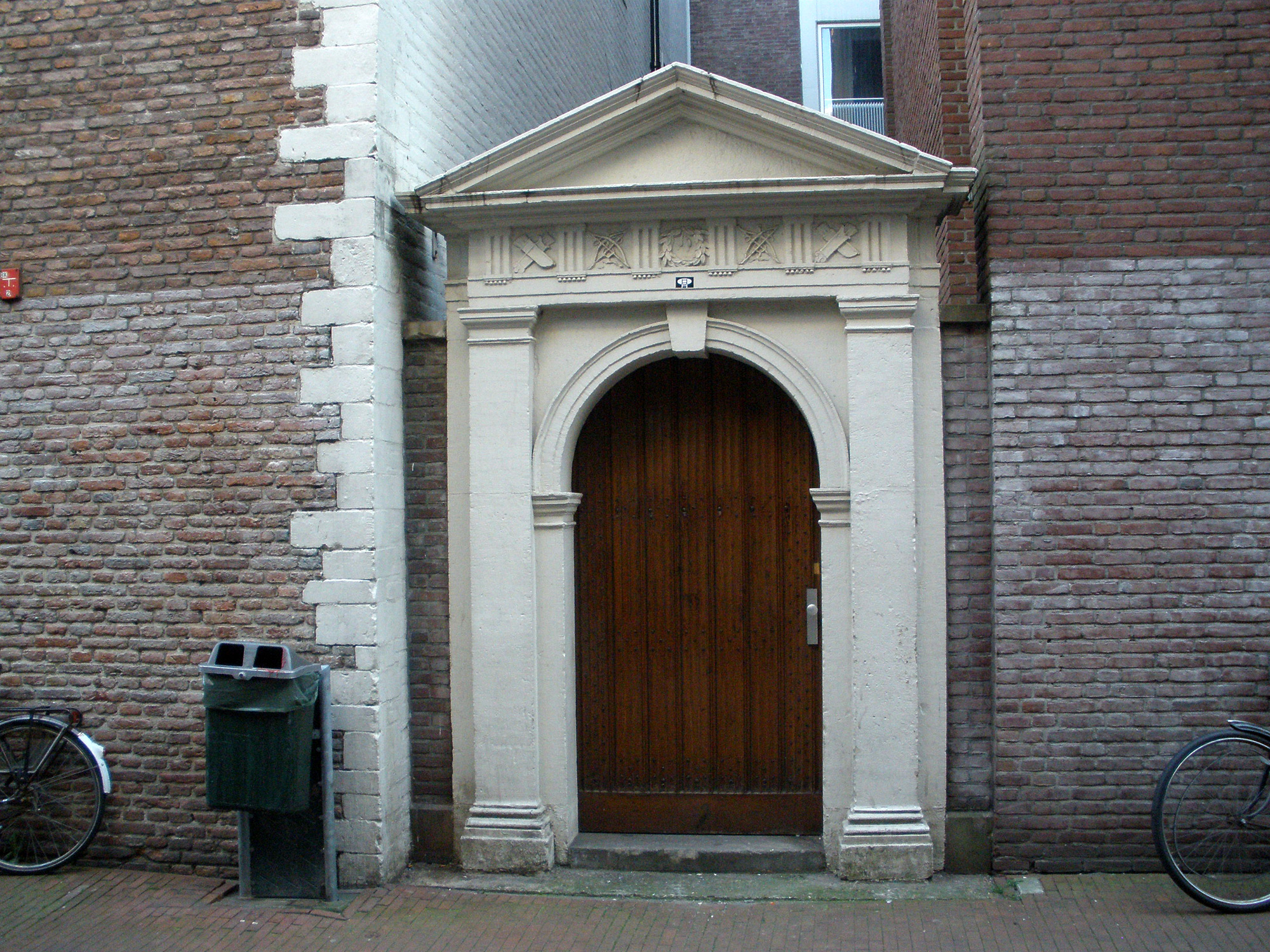 The Handboogdoelen gate in the Handboogstraat in Amsterdam